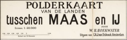 titel op kaart